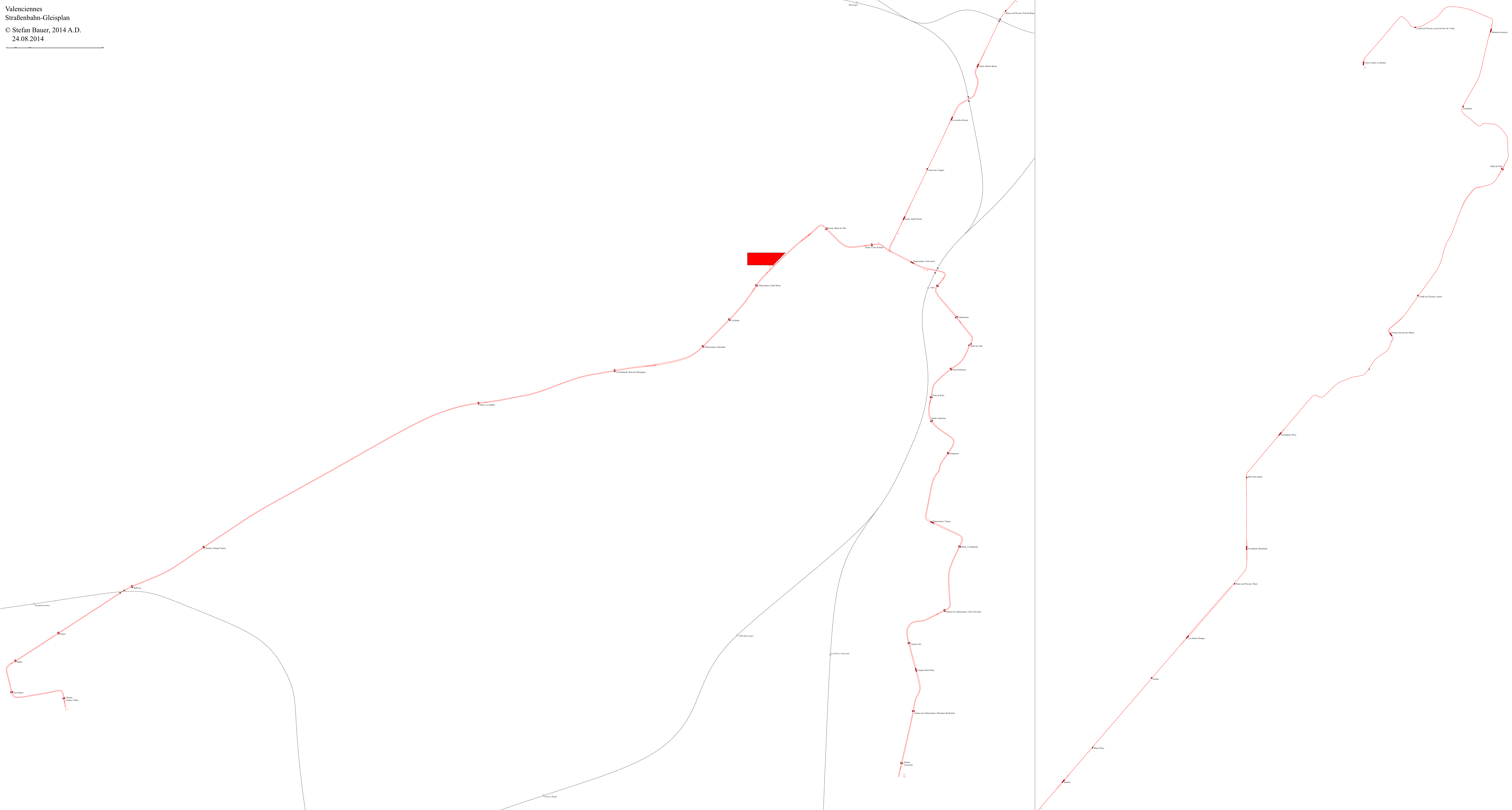 Plan des voies du réseau des tramways de Valenciennes 2014